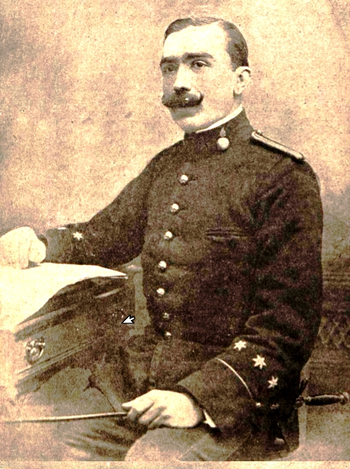 Óscar Pérez Solís (Juan Salvador —su pseudónimo—). Ex capitán de artillería y notable propagandista socialista, que recientemente ha tenido que separarse del ejército.